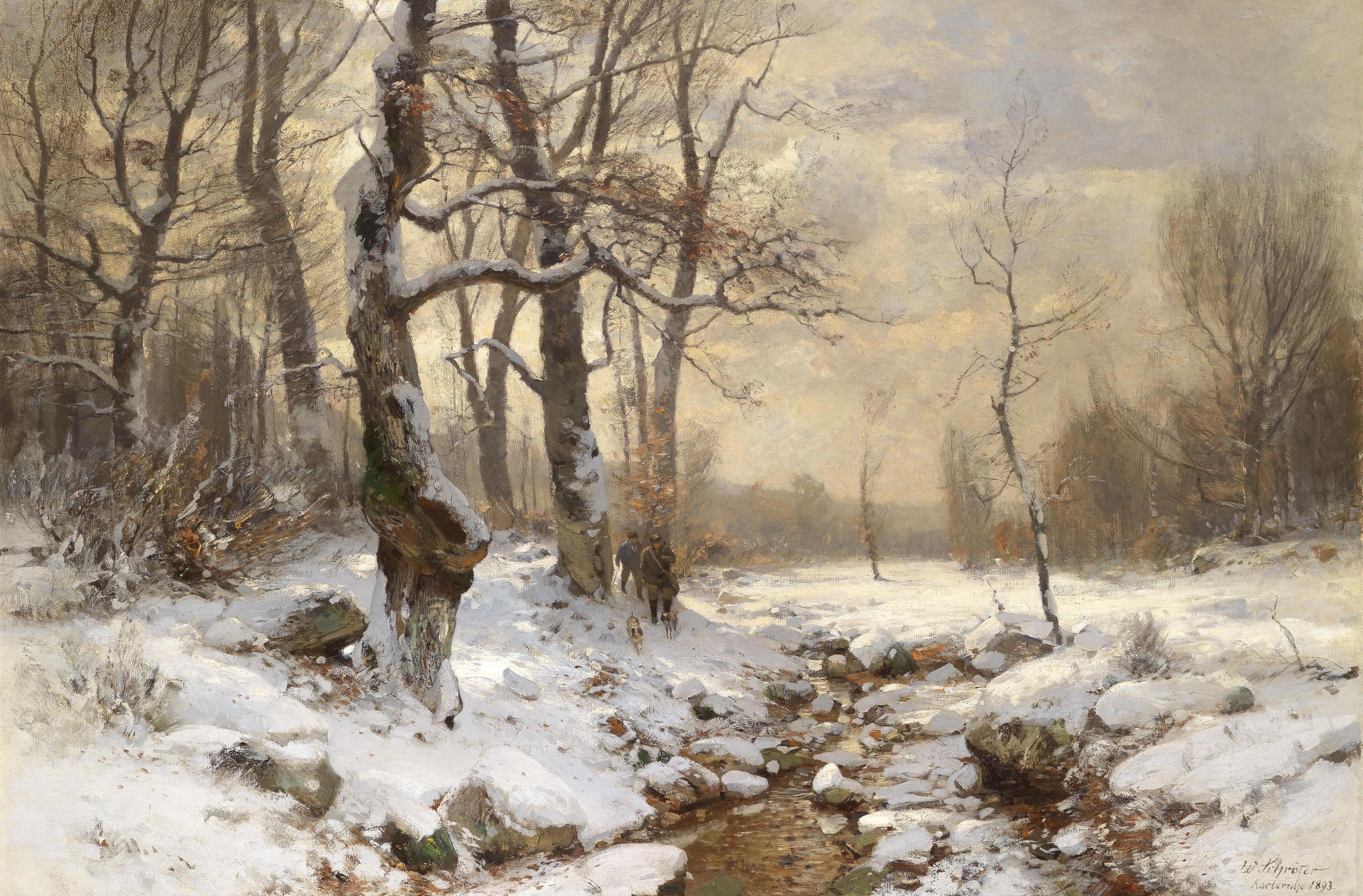 Jäger im Winterwald, signiert, datiert, bezeichnet W. Schröter Karlsruhe 1893, Öl auf Leinwand, 85 x 126,5 cm